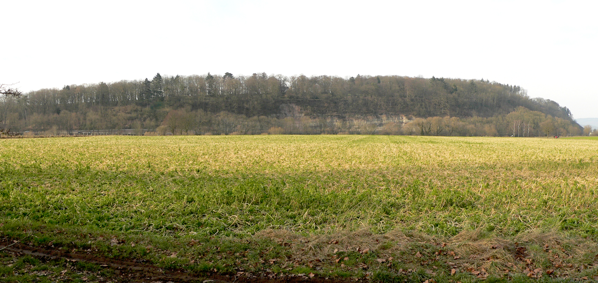 Panorama des Ohrberg